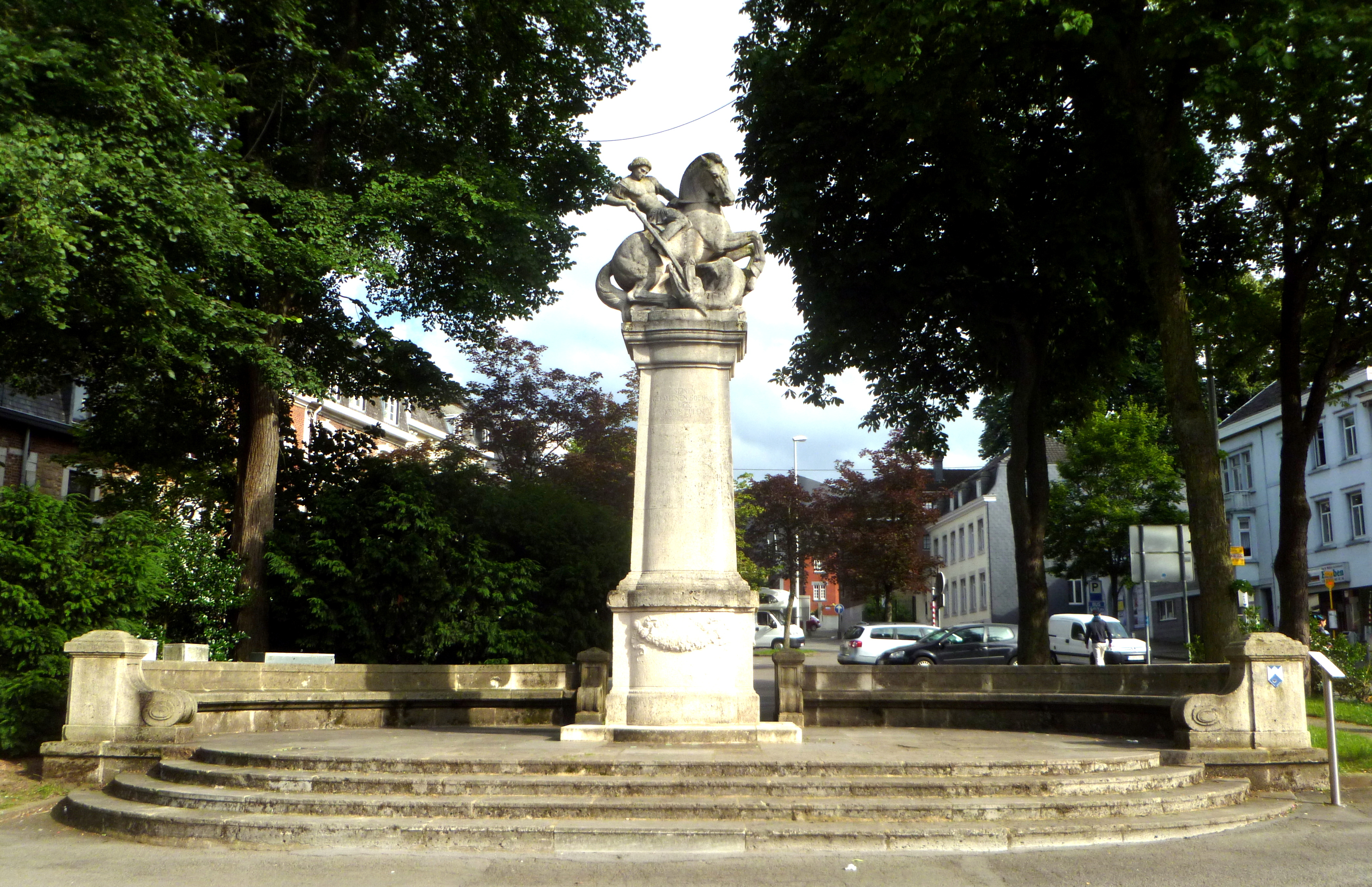 Kriegerdenkmal in Eupen, Werthplatz; 1912 von Bildhauer Rudolf Henn (München); unter Denkmalschutz